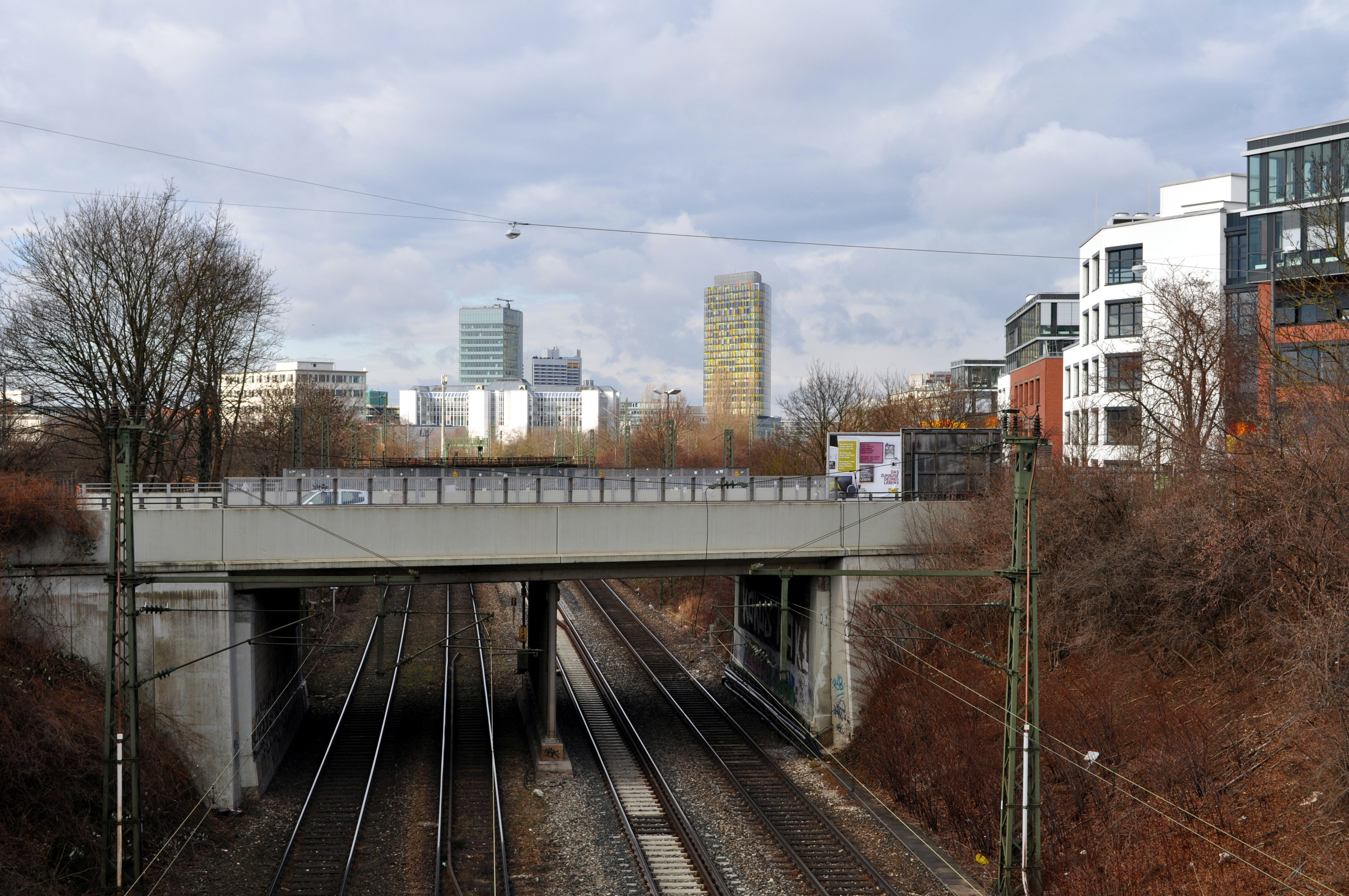 Ganghoferbrücke über den Münchner Südring; Fotografiert von Osten